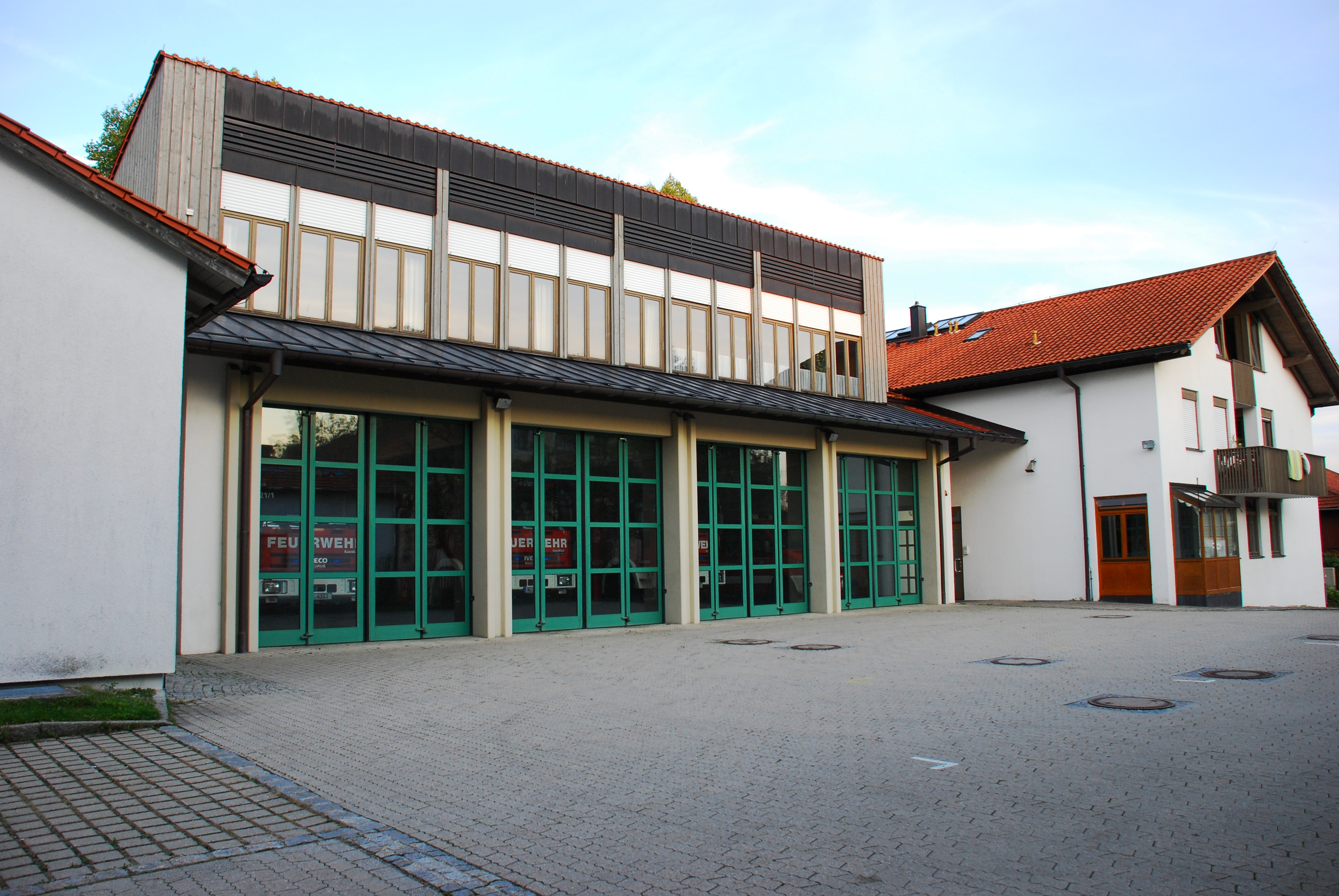 Feuerwehrhaus in Sauerlach, Landkreis München, Regierungsbezirk Oberbayern, Bayern.